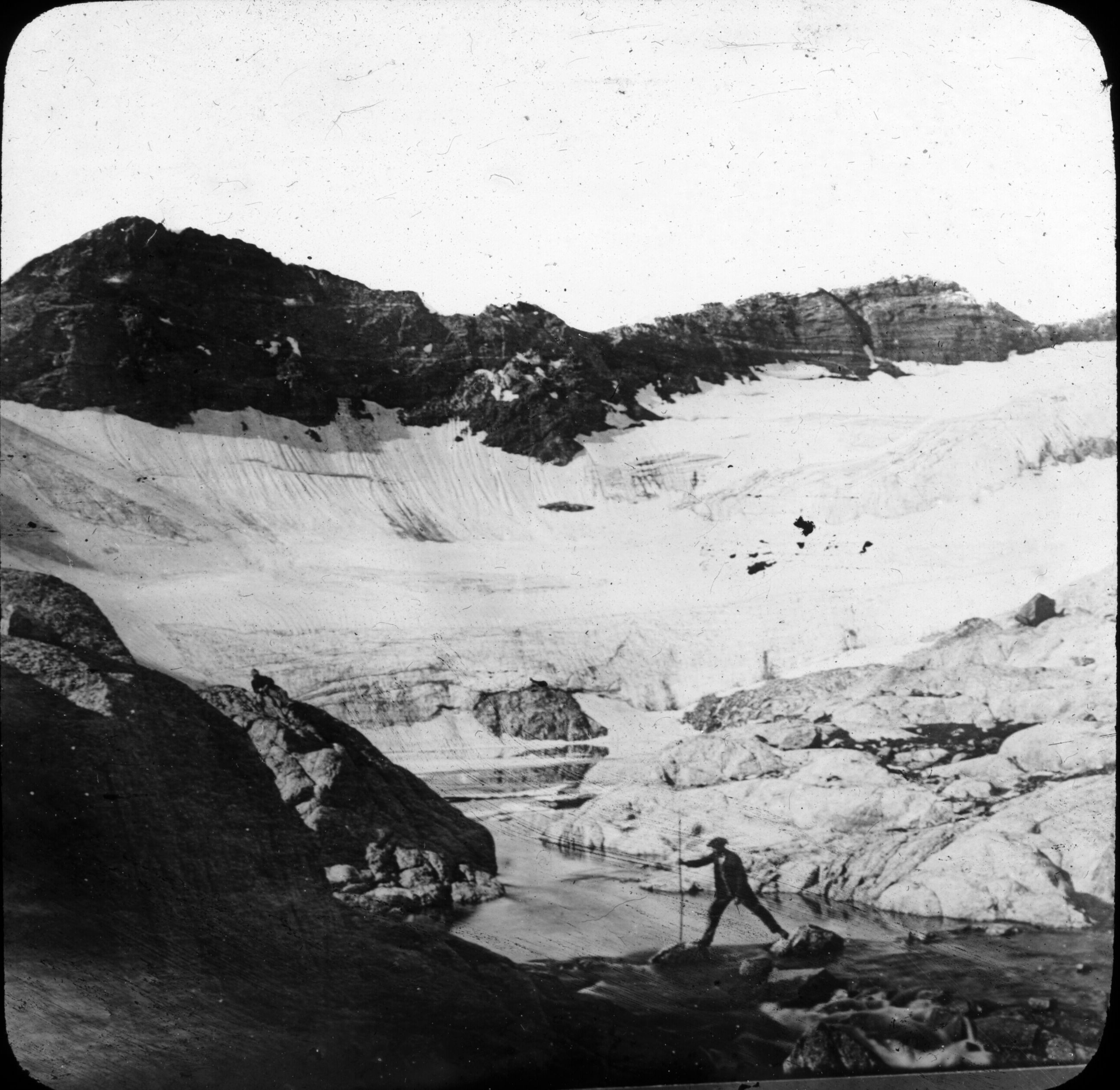 Fonds Trutat - Photographie ancienne Cote : TRU C 305 Localisation : Fonds ancien Original non communicable Titre : Déversoir du lac glacé du Portillon, 4e lac Auteur : Trutat, Eugène Rôle de l’auteur : Photographe Lieu de création : Pyrénées (Espagne) Date de création : : 1859-1910 [entre] Mesures : 9 x 10 cm Observations : Cette plaque ne serait pas de Trutat mais ferait partie de sa collection de plaques de projection destinées à ses cours Mention sur la plaque "Société de Géographie de Toulouse" Mot(s)-clé(s) : -- Montagne -- Pic -- Sommet (montagne) -- Glacier -- Neige -- Crête (montagne) -- Versant rocheux -- Lac -- Homme -- Costume masculin -- Bâton -- Rocher -- Pyrénées (Espagne) -- 19e siècle, 2e moitié -- 20e siècle, 1e quart Médium : Photographies -- Positifs sur plaque de verre -- Noir et blanc -- Paysages de montagne Bibliographie : Frappé (Jean-Bernard). - Autrefois Bagnères de Luchon. Tome I. - Anglet : Atlantica, 2001. - 345 p. ; 15 x 22 cm. - (Autrefois) cf. p. 140-141. Bibliothèque de Toulouse. Domaine public